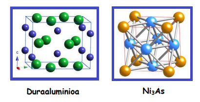 Konposatu intermetalikoen bi adibide